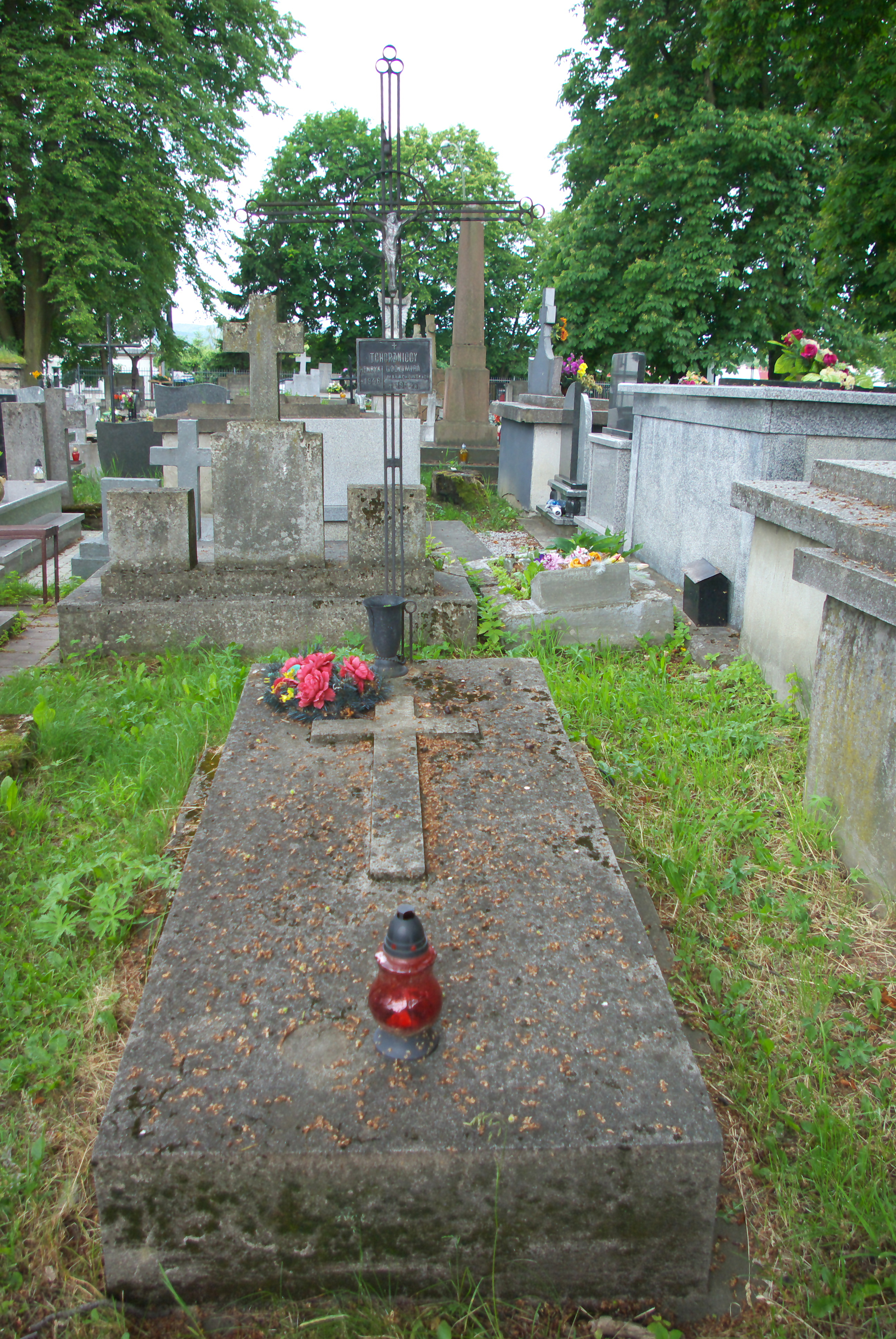 Nagrobek Henryka i Godzimiry Tchorznickich na Cmentarzu Centralnym w Sanoku.